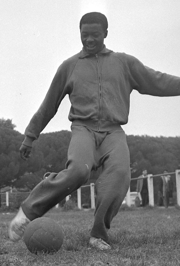 Terrain à côté du Stadium municipal de Toulouse, 1bis allées Gabriel-Biénès. Entre 15 et 18 octobre 1962. Pierre Dorsini (à gauche) et Samuel Edimo (à droite), joueurs du Toulouse Olympique Club. Vue de face des deux joueurs qui s'apprêtent à frapper dans un ballon ; en arrière-plan Stadium.